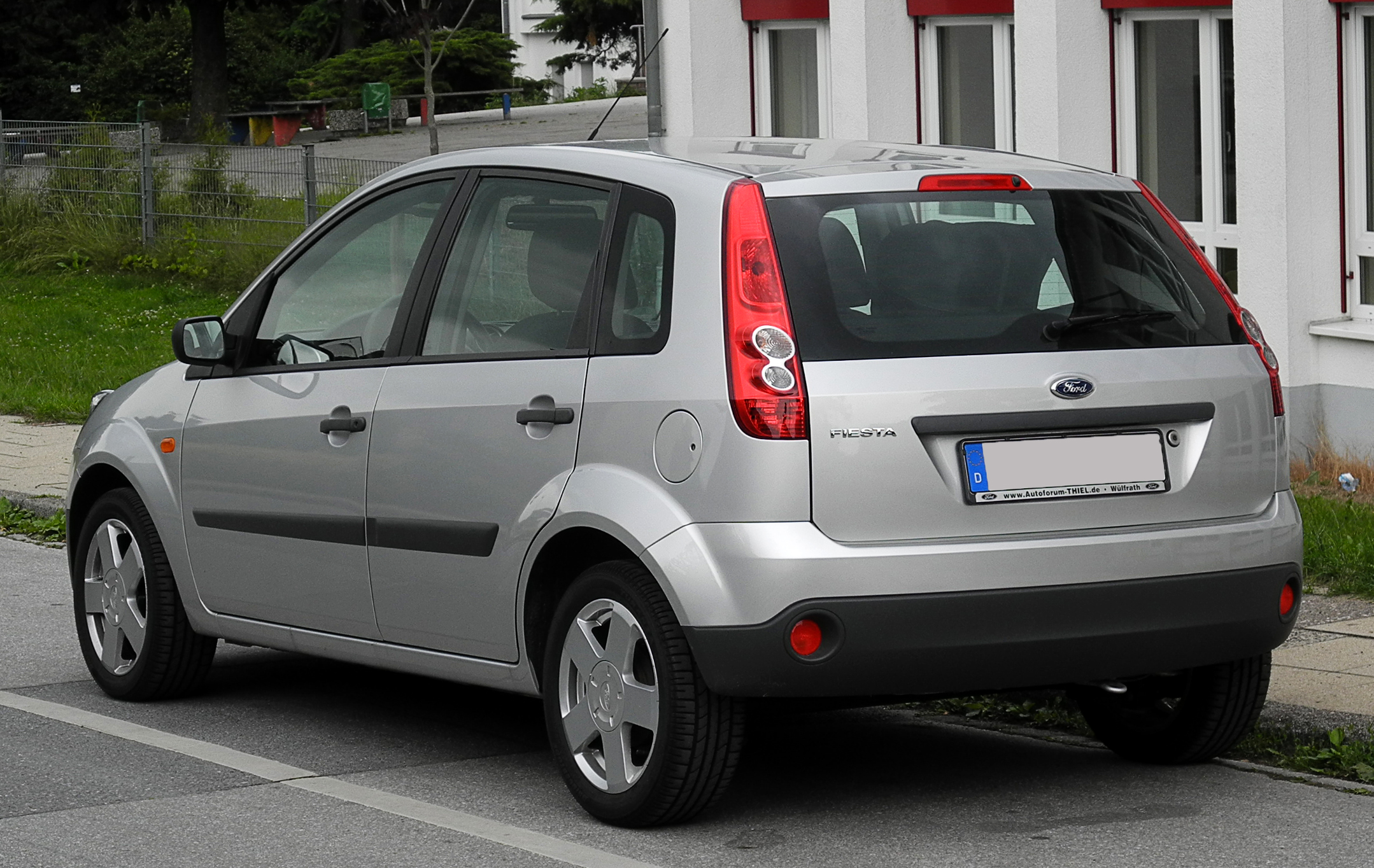 Ford Fiesta (VI, Facelift)